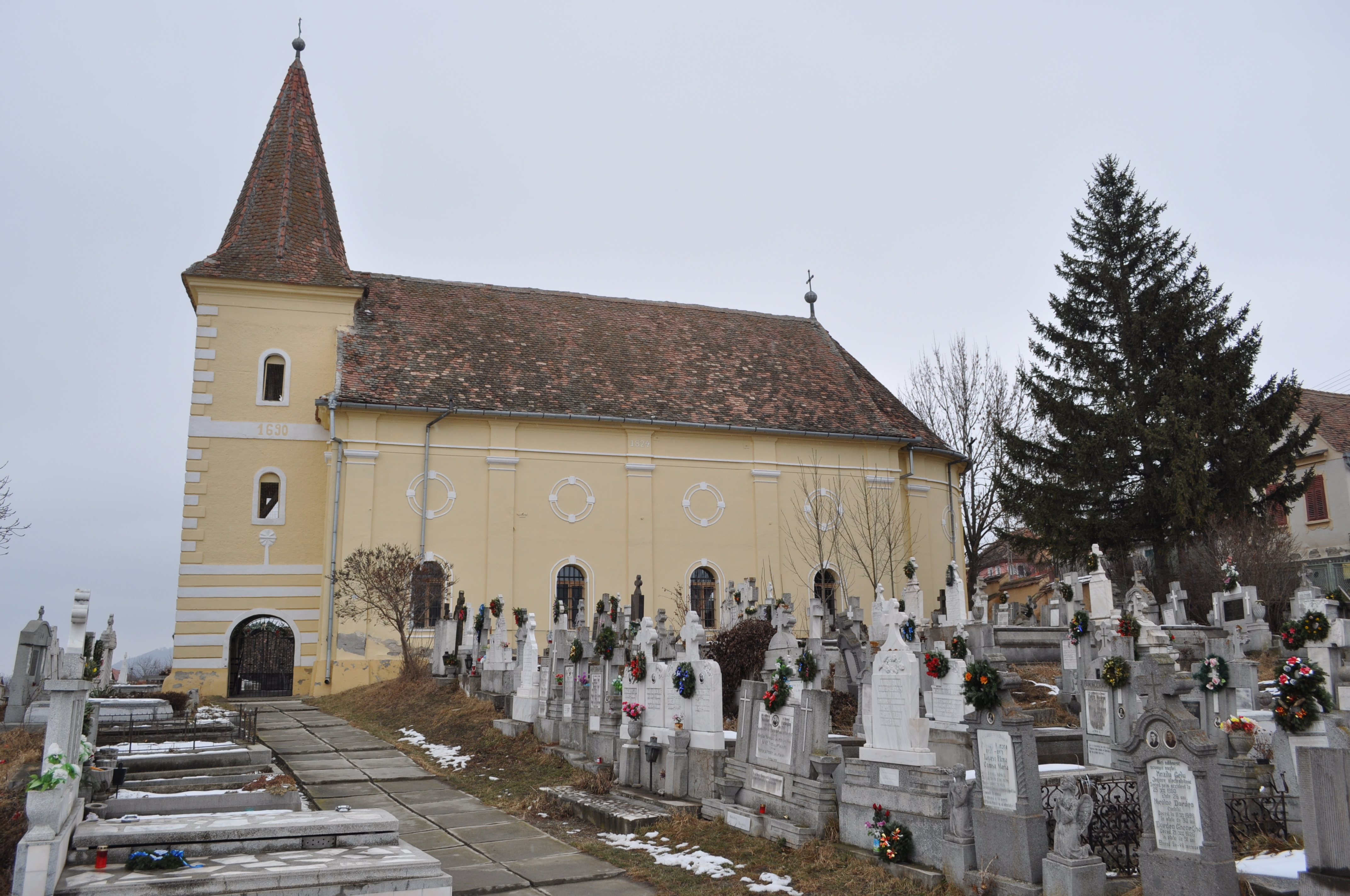 Biserica "Sfânta Maria" din Bungard, județul Sibiu 01